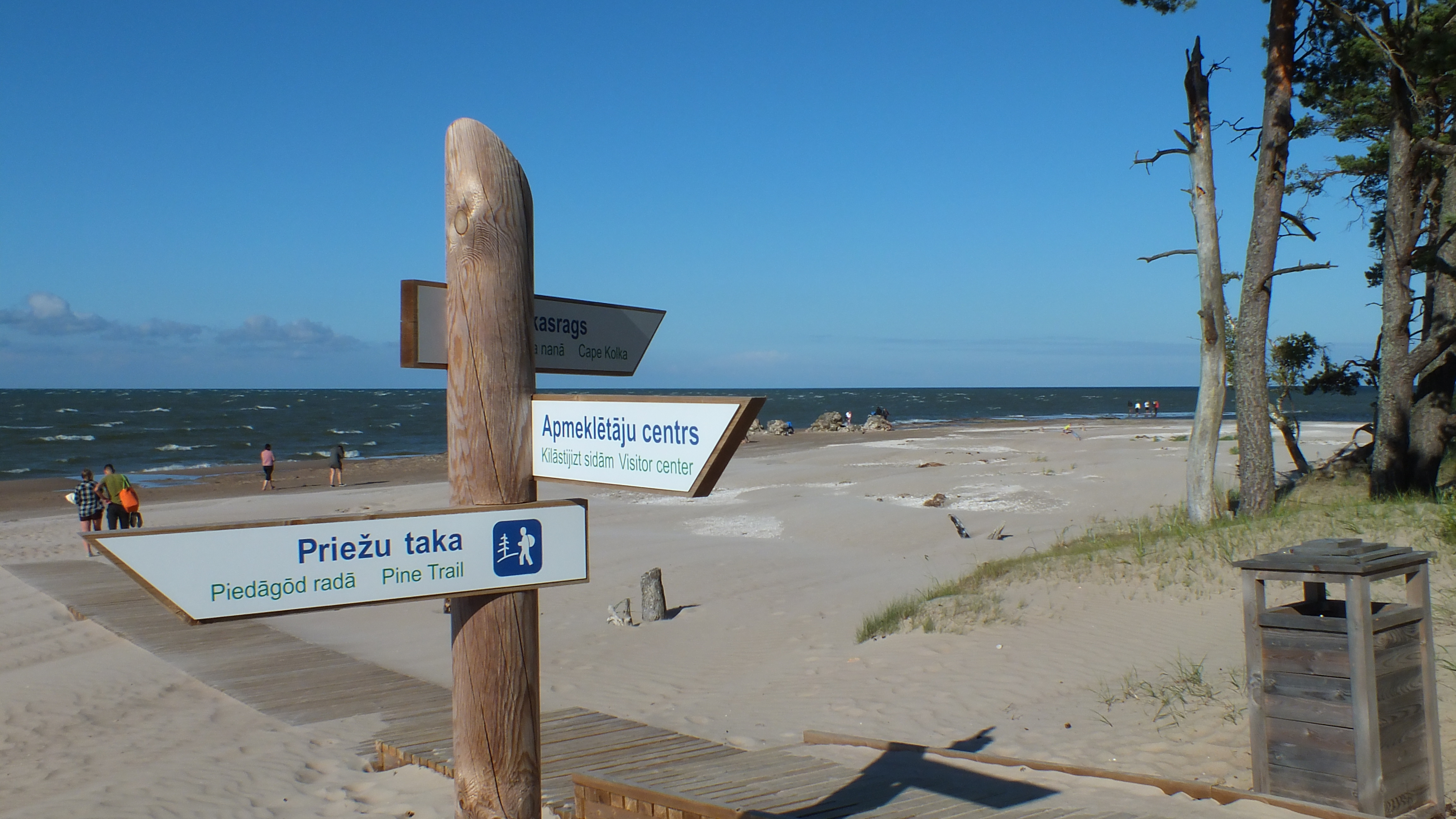 Norādes Kolkasragā